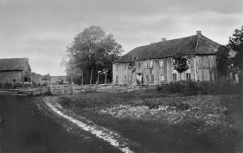 Gammelt foto av Tronstad gård med hovedbygningen som ble revet i 1899.